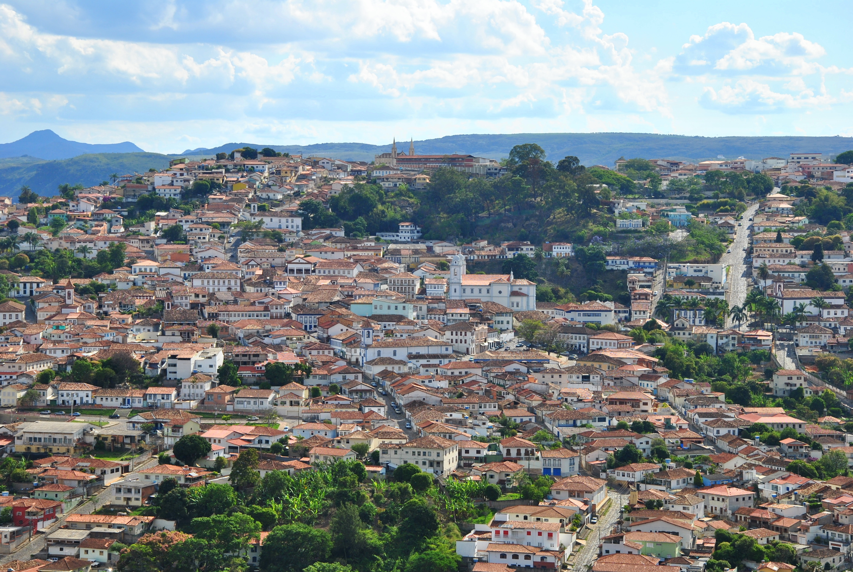 Diamantina (MG), Brazil.